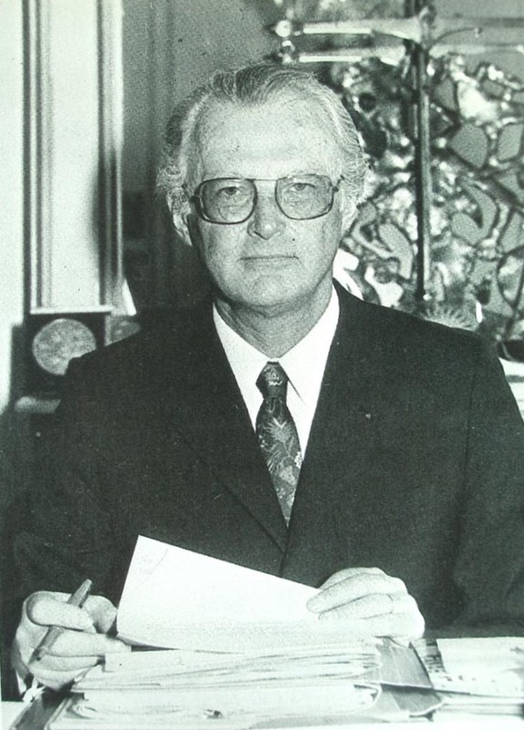 Pierre Dehaye dans son bureau de directeur de la Monnaie de Paris